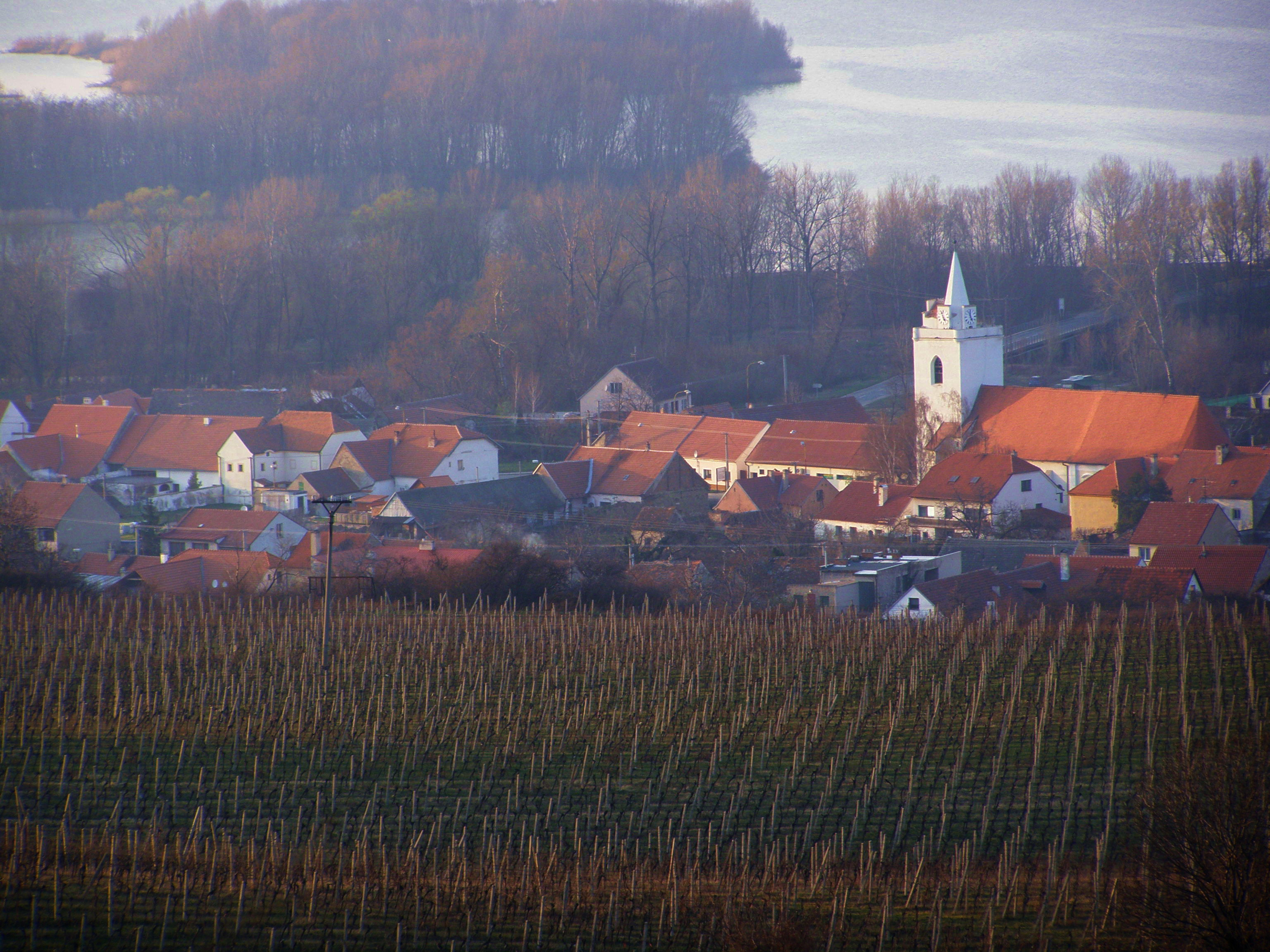 Dolní Věstonice, v pozadí vodní nádrž Nové Mlýny